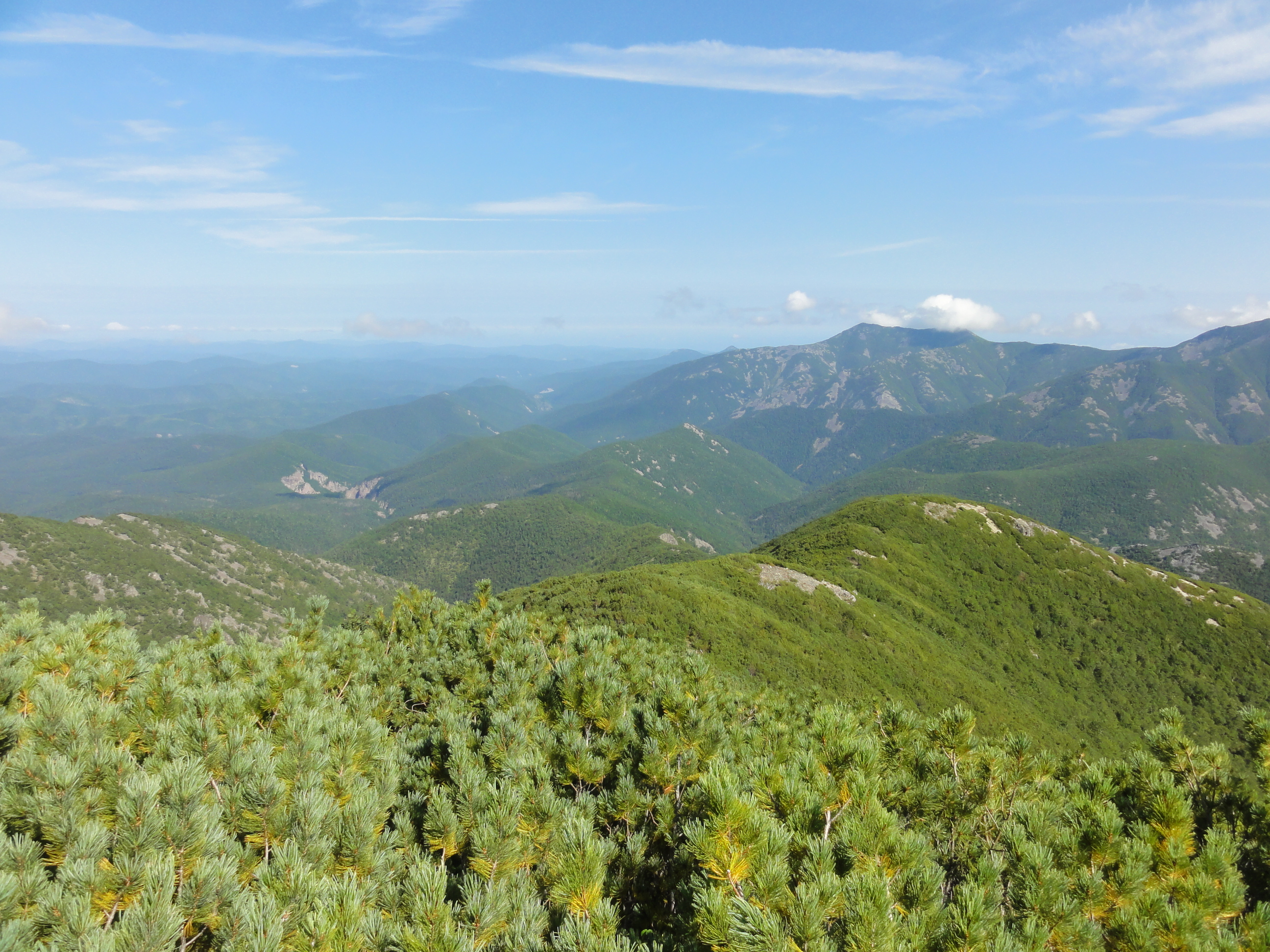 Бассейн Амгу с Тумана